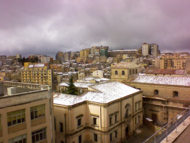 Panorama of Enna city center covered by snow-Panoramica del centro storico di Enna innevato